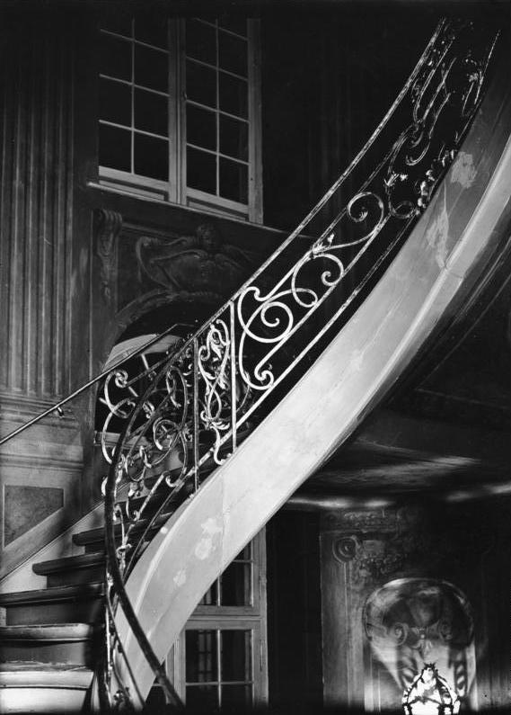 Berlin - Ermelerhaus des Märkischen Museums; Geschmiedetes Geländer im Treppenhaus (Aus dem Jahre 1762); Aufnahme 1932.